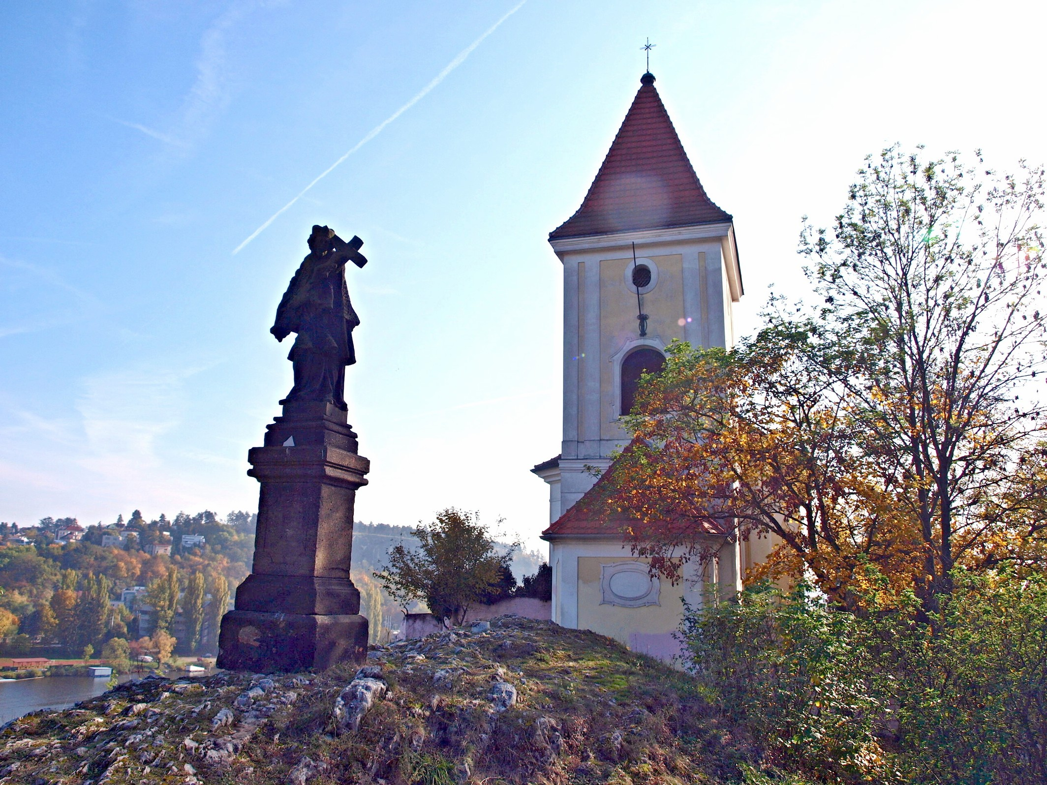 Kostel svatých Filipa a Jakuba na Zlíchově